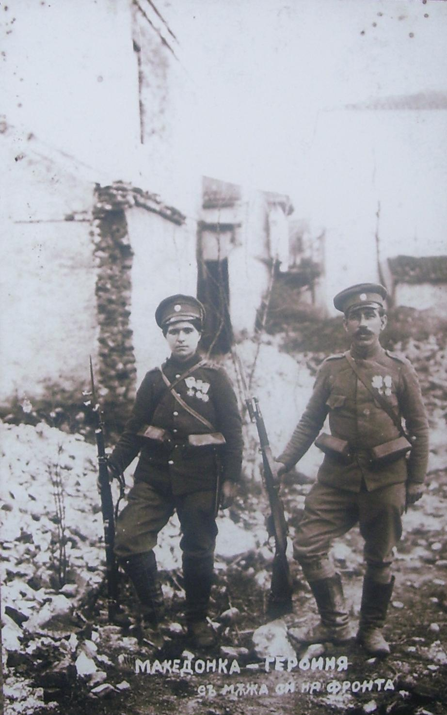 Донка и Ставри Ушлинови в 60 пехотен полк